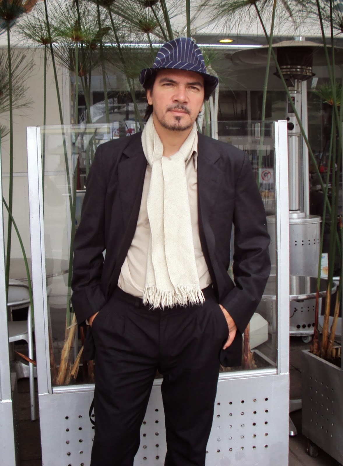 En Bogotá